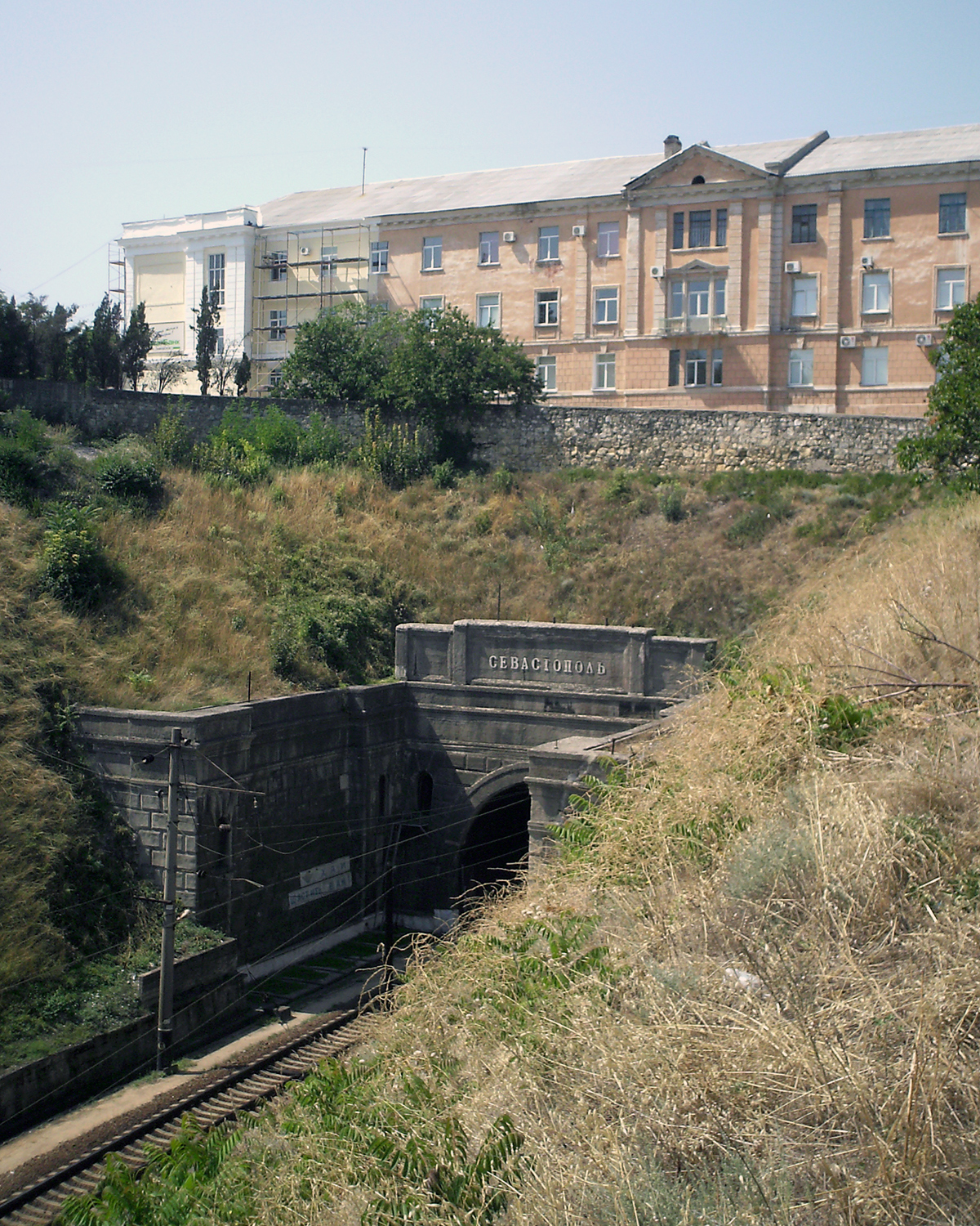 въезд Городского туннеля